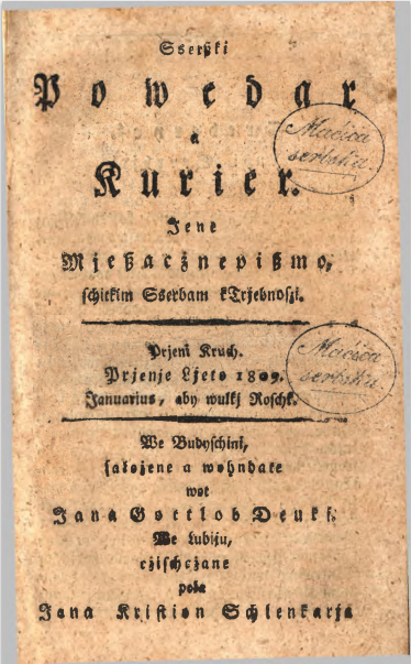 Титульный лист газеты «Serbski powědar a kurěr» за 1809 год